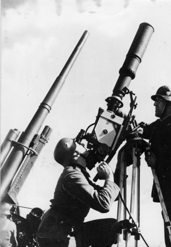 PK-Filmberichter an Kamera Die Deutsche Wochenschau entsteht. Nebem dem gewaltigen Geschütz ragt das Teleobjektiv des Wochenschau-Kriegsberichters, der wie sein Kamerad am Geschütz im Stahlhelm, Soldat wie er, seine Pflicht erfüllt. PK Presse Hoffmann 44608-4 Fr. OKW Freigegeben Bildpresse, 21. Jan. 1941 [Filmberichter einer Propagandakompanie an einer Filmkamera mit Teleobjektiv, parallel zum Rohr eines schweren Flak-Geschützes]